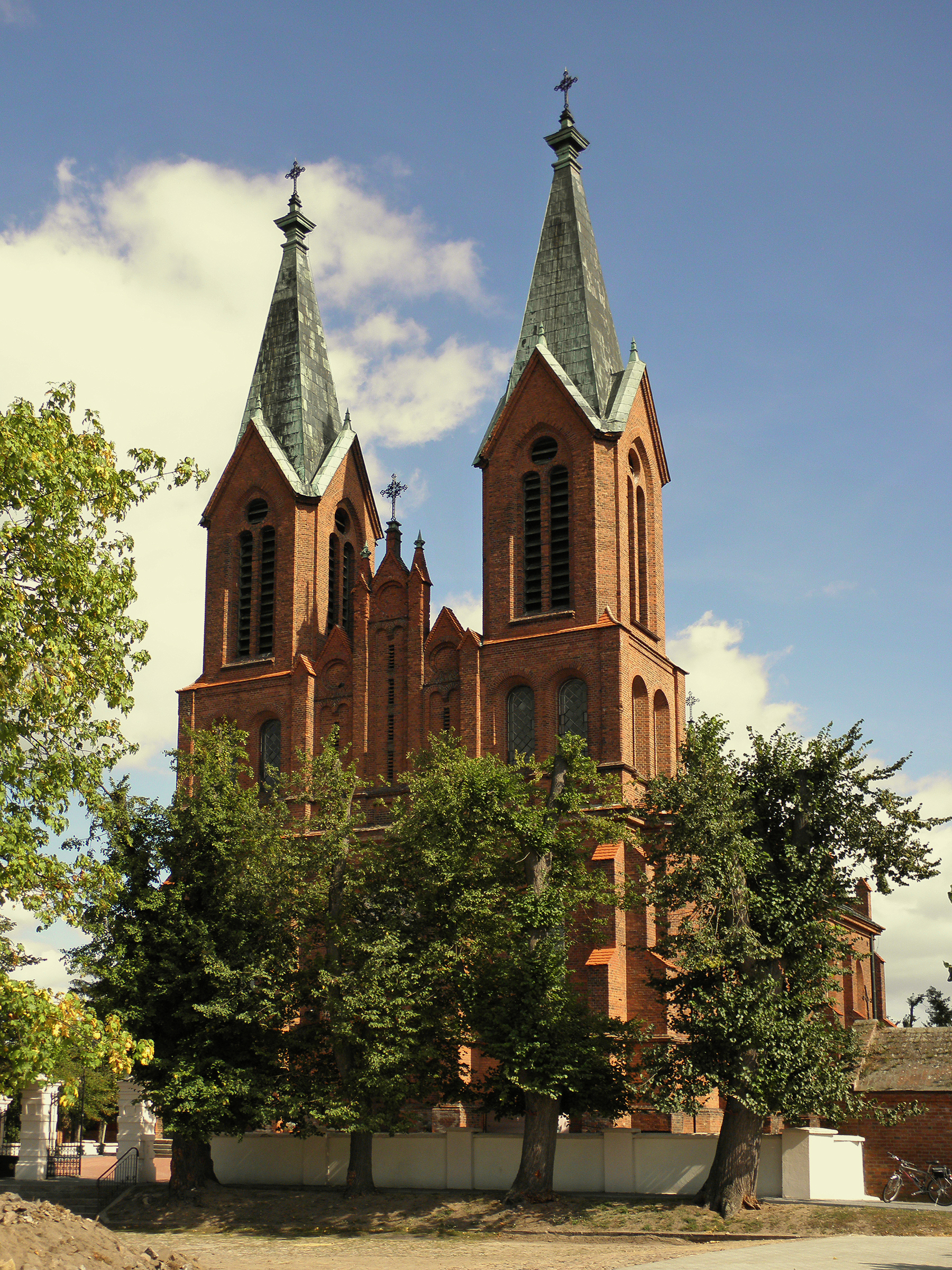 Przybyszew - kościół śś. Piotra i Pawła.